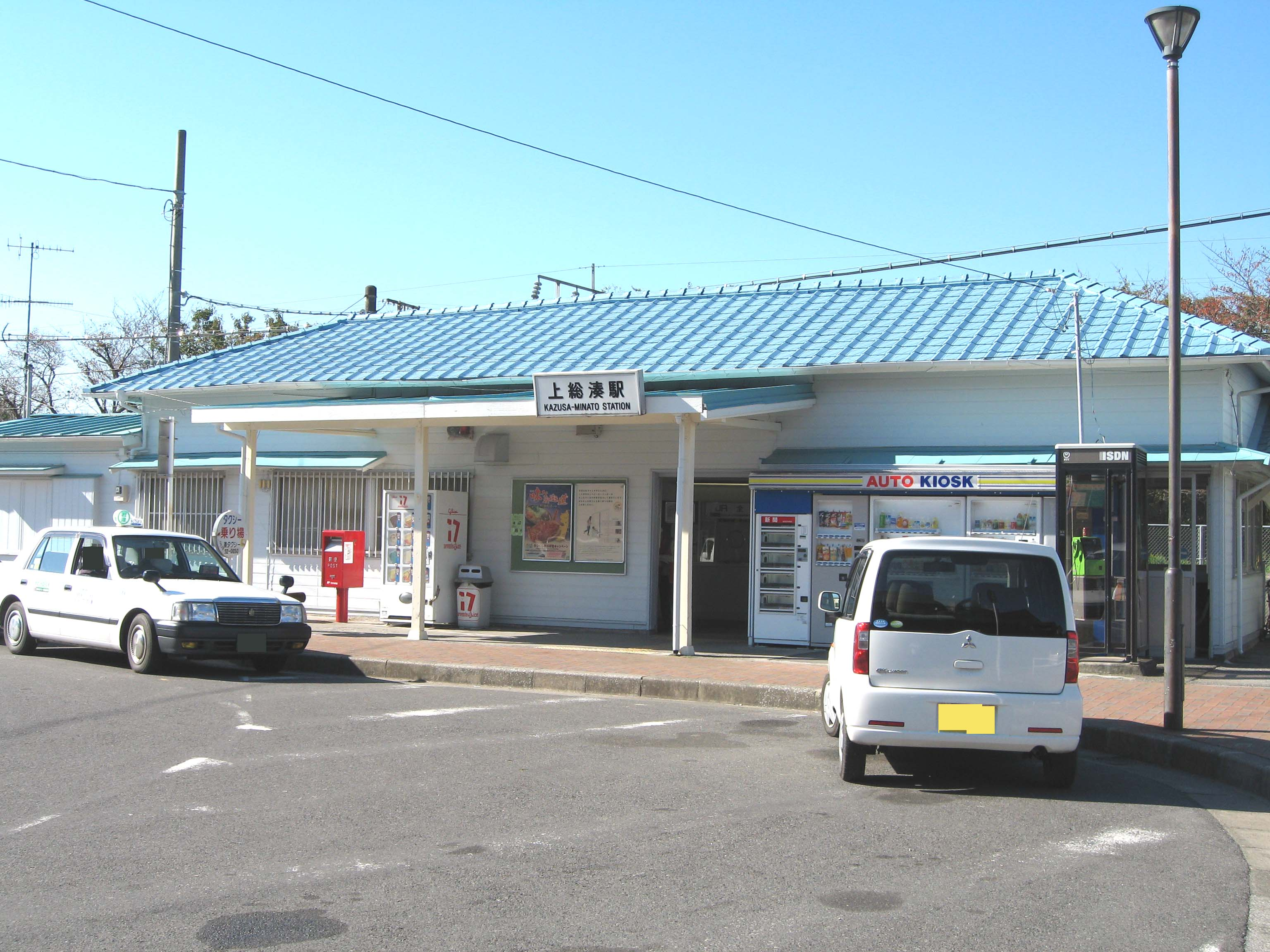 Kazusaminato station, Uchibo Line, Chiba, Japan, 上総湊駅駅舎